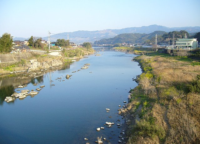 筑後川 久大本線車窓より下流方を望む（筑後大石駅～夜明駅） 川を挟んで左側と右側奥が福岡県うきは市、右側手前が大分県日田市